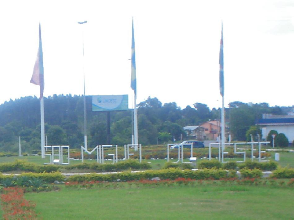 Trevo SMOeste